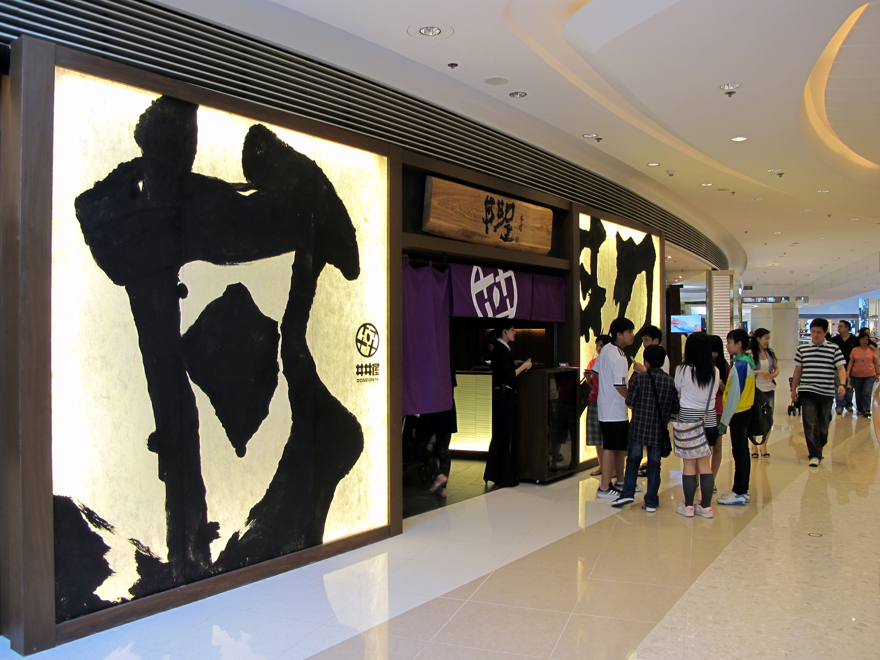 DondonYa in Elements